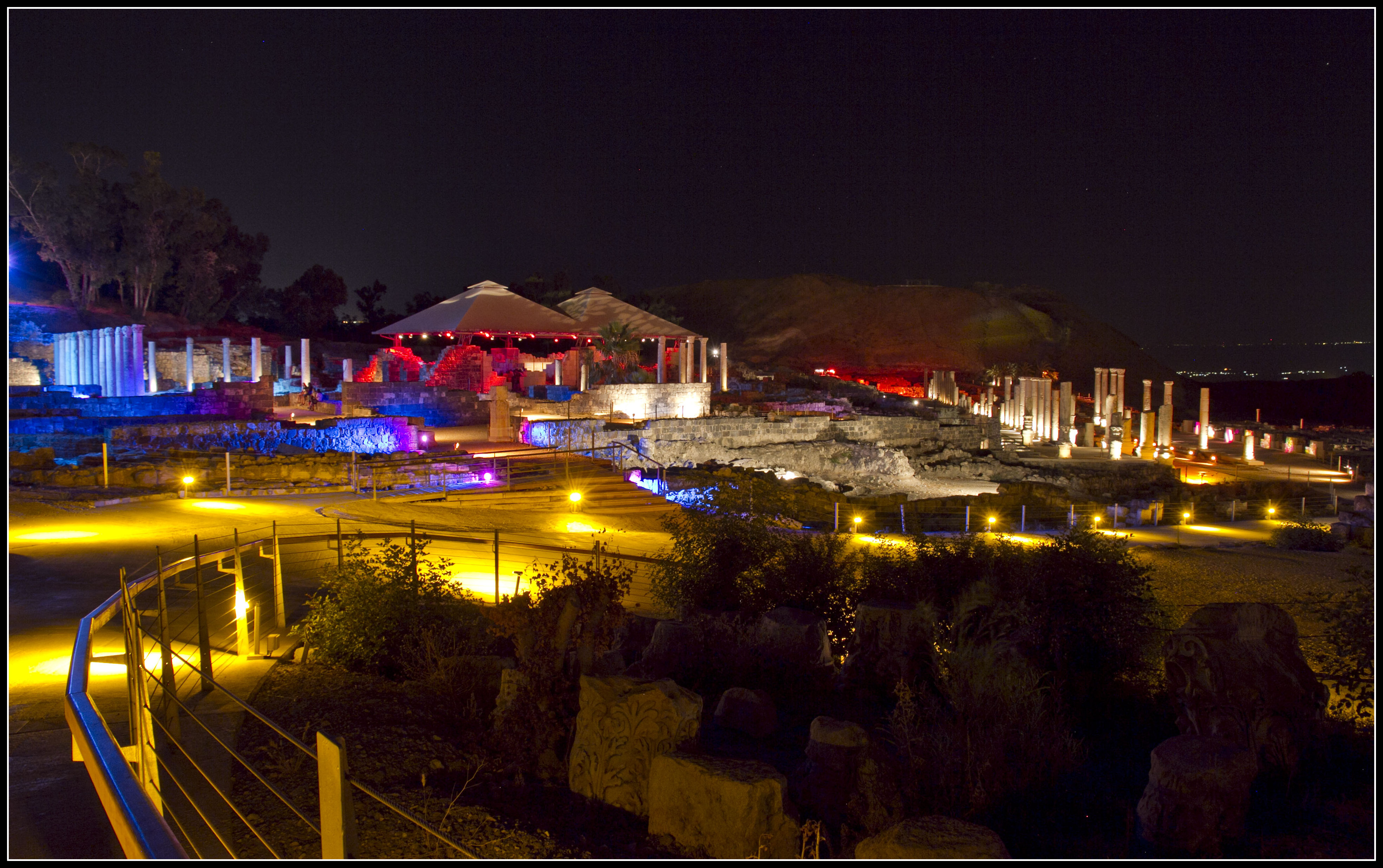 בית שאן מוזכרת במקורות והיא מיושבת ברציפות מאז התקופה הכלקוליתית (4000 לפנה"ס).היא ממוקמת על צירים של כמה דרכים אסטרטגיות:ירושלים-טבריה ; בקעת הירדן-הים התיכון; דרך הים שחיברה בין מצריים למסופוטמיה, נמצאת על נקודת המפגש בין בקעת הירדן לעמק יזרעאל .